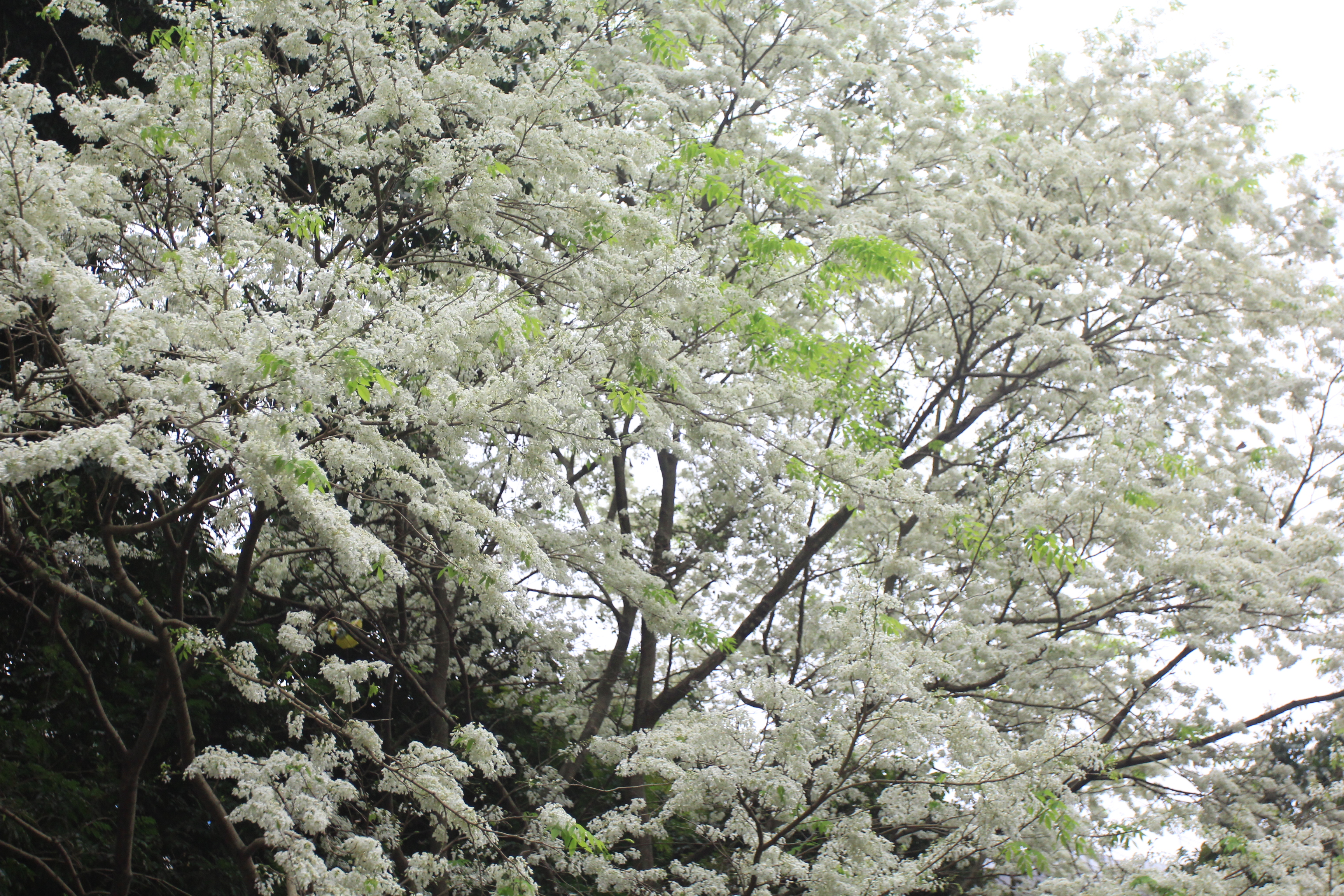 Phố Phan Đình Phùng, Hà Nội